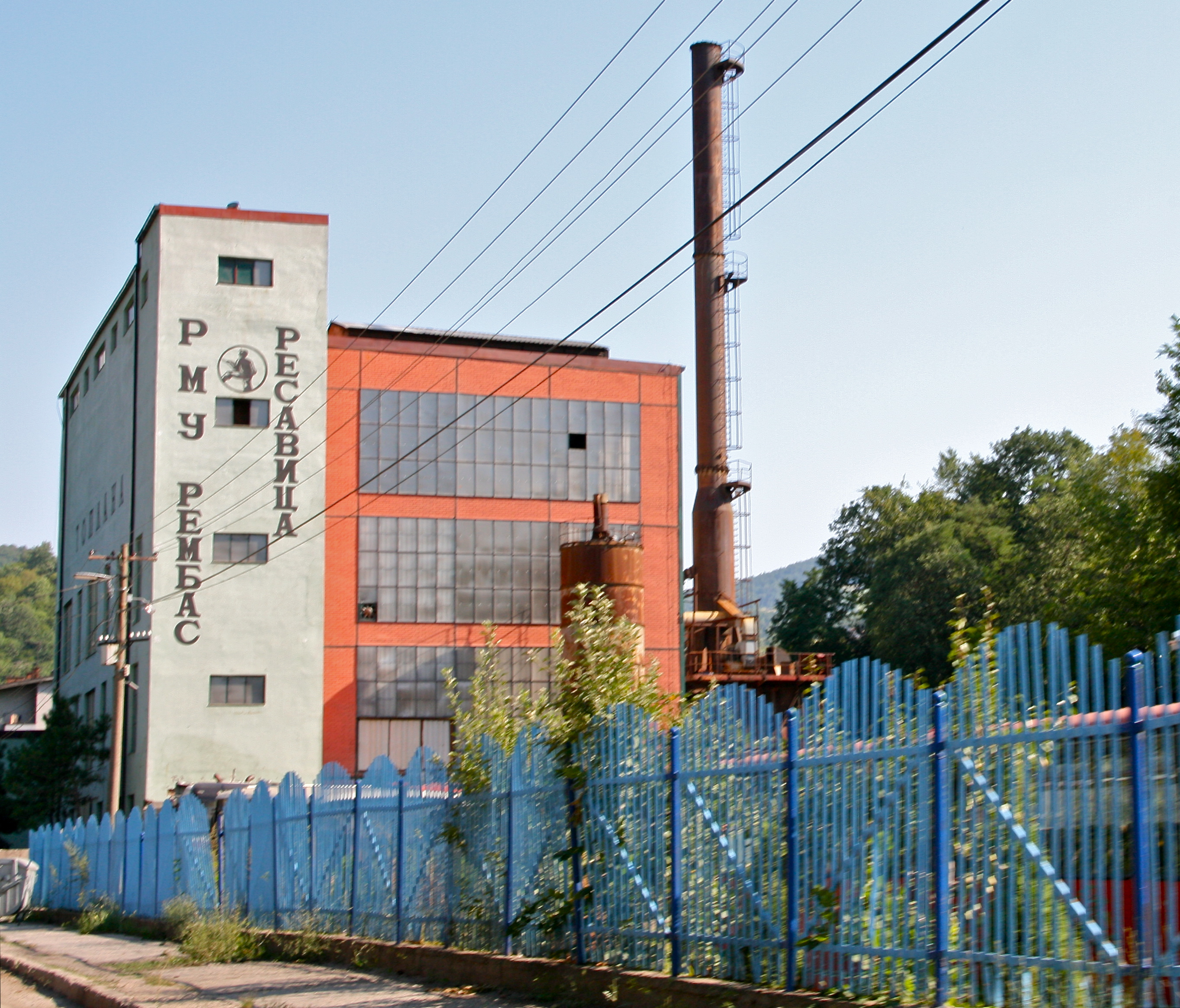 РЕМБАС у Ресавици